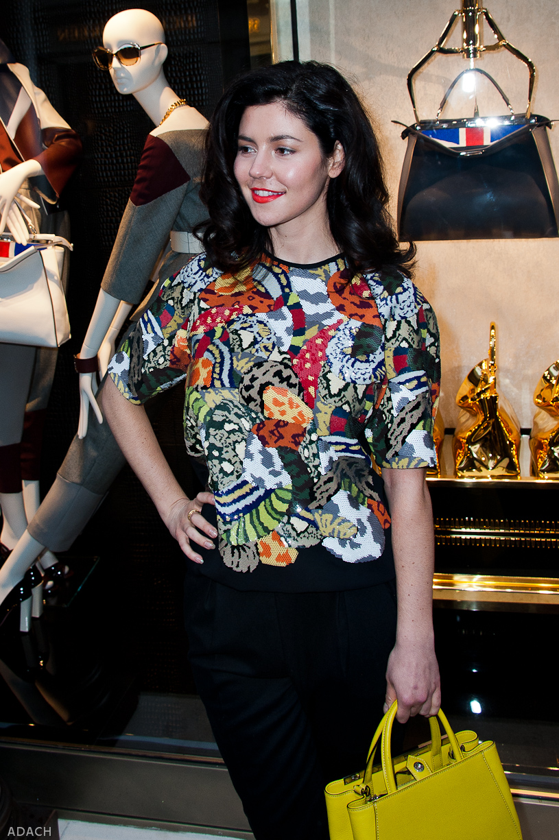 Fendi store opening - Marina Lambrini Diamandis